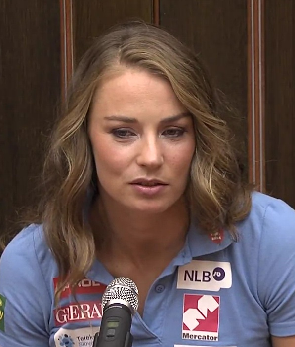 Tina Maze